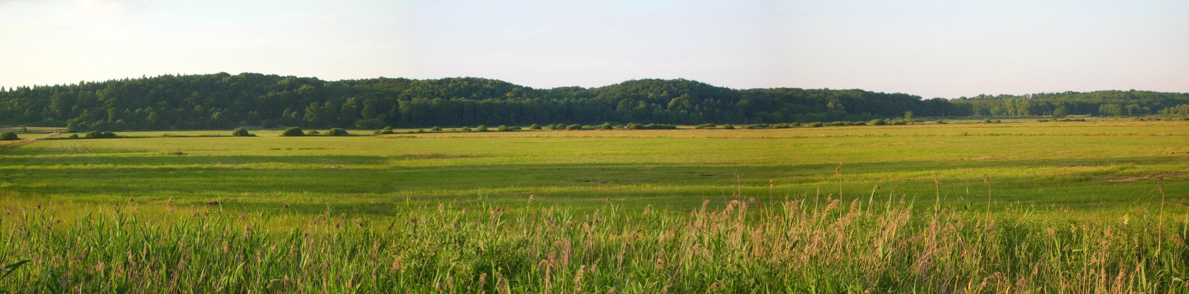 Las Minikowski rezerwat przyrody na północnym zboczu Pradoliny Toruńsko-Eberswaldzkiej, między Bydgoszczą, a Nakłem